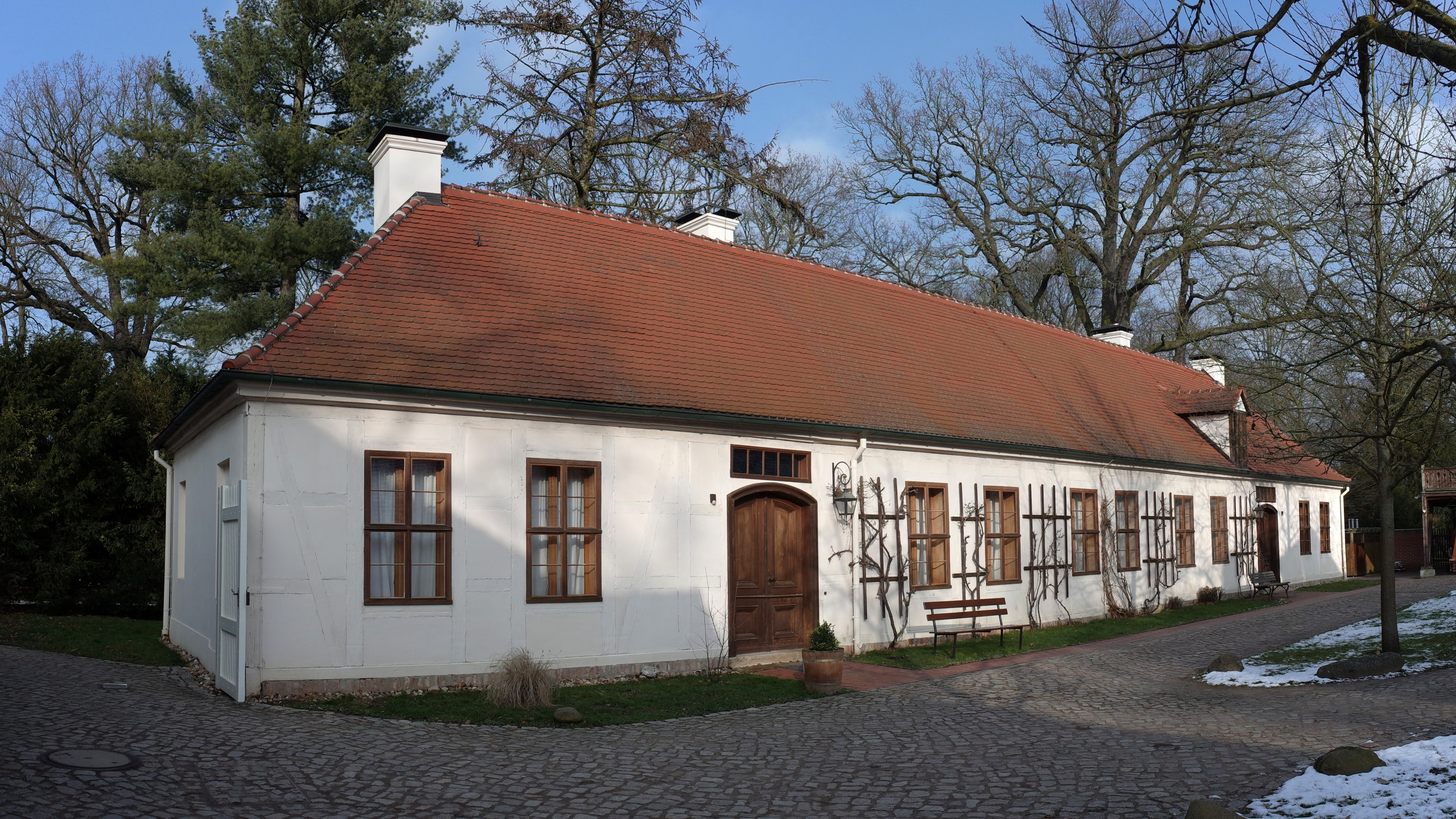 Dessau-Roßlau, das Eyserbeck-Haus im Park Luisium. In dem um 1750 errichteten Gebäude befand sich die Wohnung des Hofgärtners Johann Friedrich Eyserbeck. Heute wird diese als Ferienhaus der Kulturstiftung Dessau Wörlitz genutzt [1].